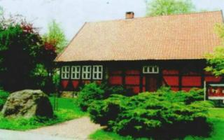 Der Junkerhof, ein öffentliches Gebäude in Wittingen.